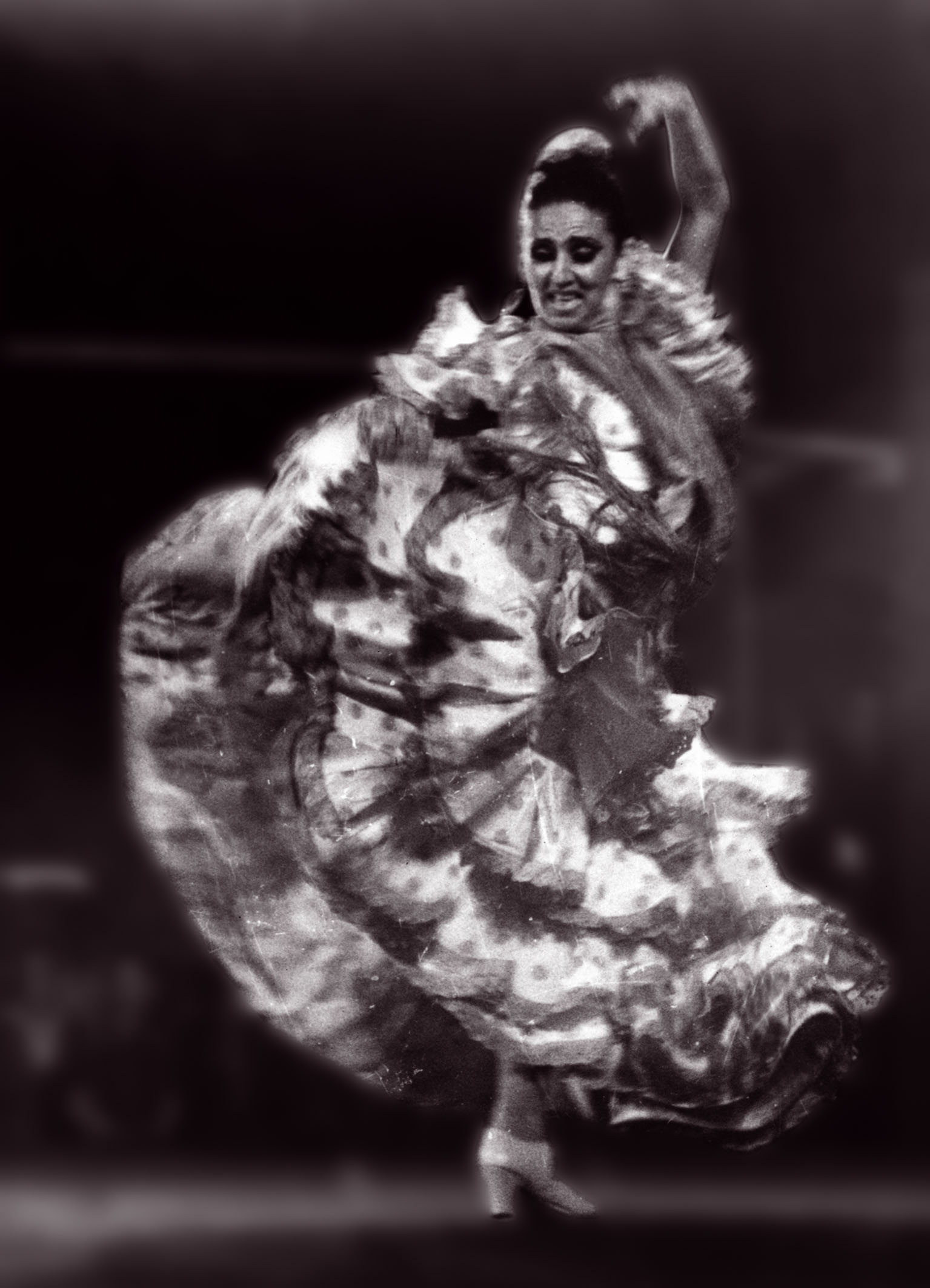 Gran espectáculo, la 1ra Huella de España en Cuba, donde la Bustamante ofreció una magnífica actuación, para que este fuera un día especial para todos los españoles e hijos.